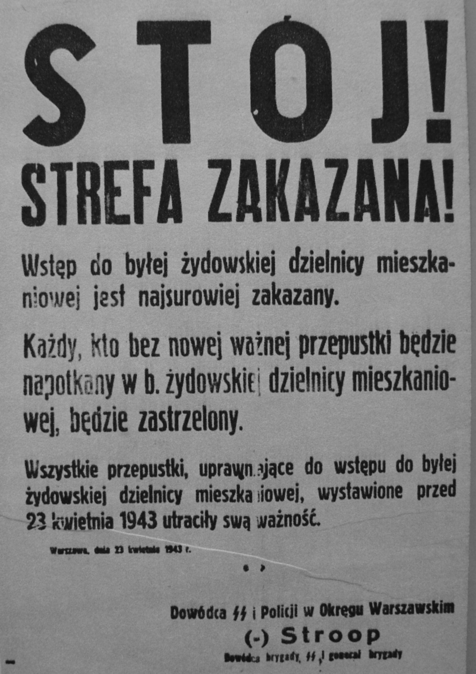 "Stój! strefa zakazana!" Odezwa zakazująca wstępu do żydowskiej dzielnicy mieszkaniowej pod groźbą kary śmierci podpisany przez Jurgena Stroopa.